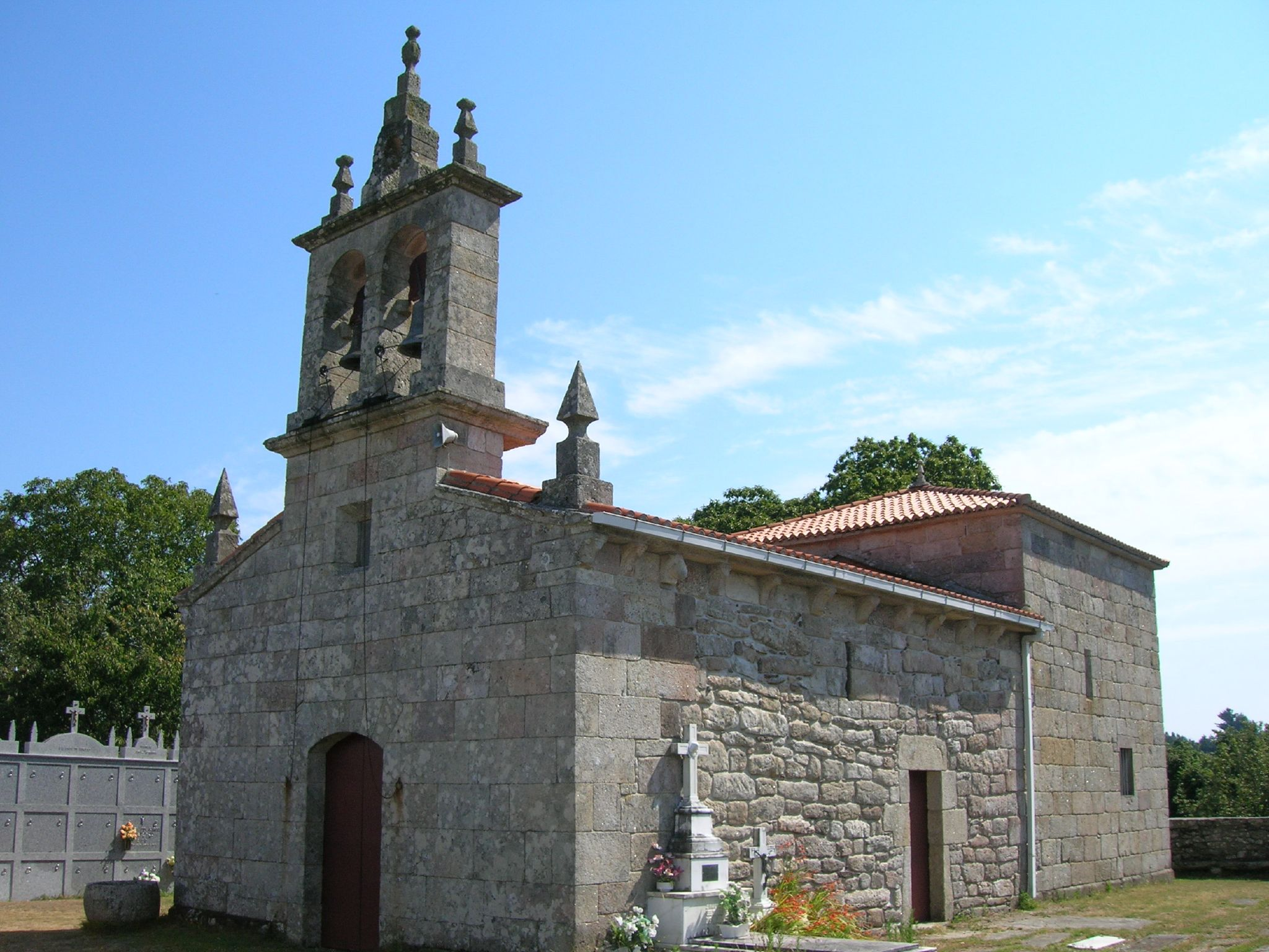 Iglesia de San Miguel de Cervela - Antas de Ulla - Lugo